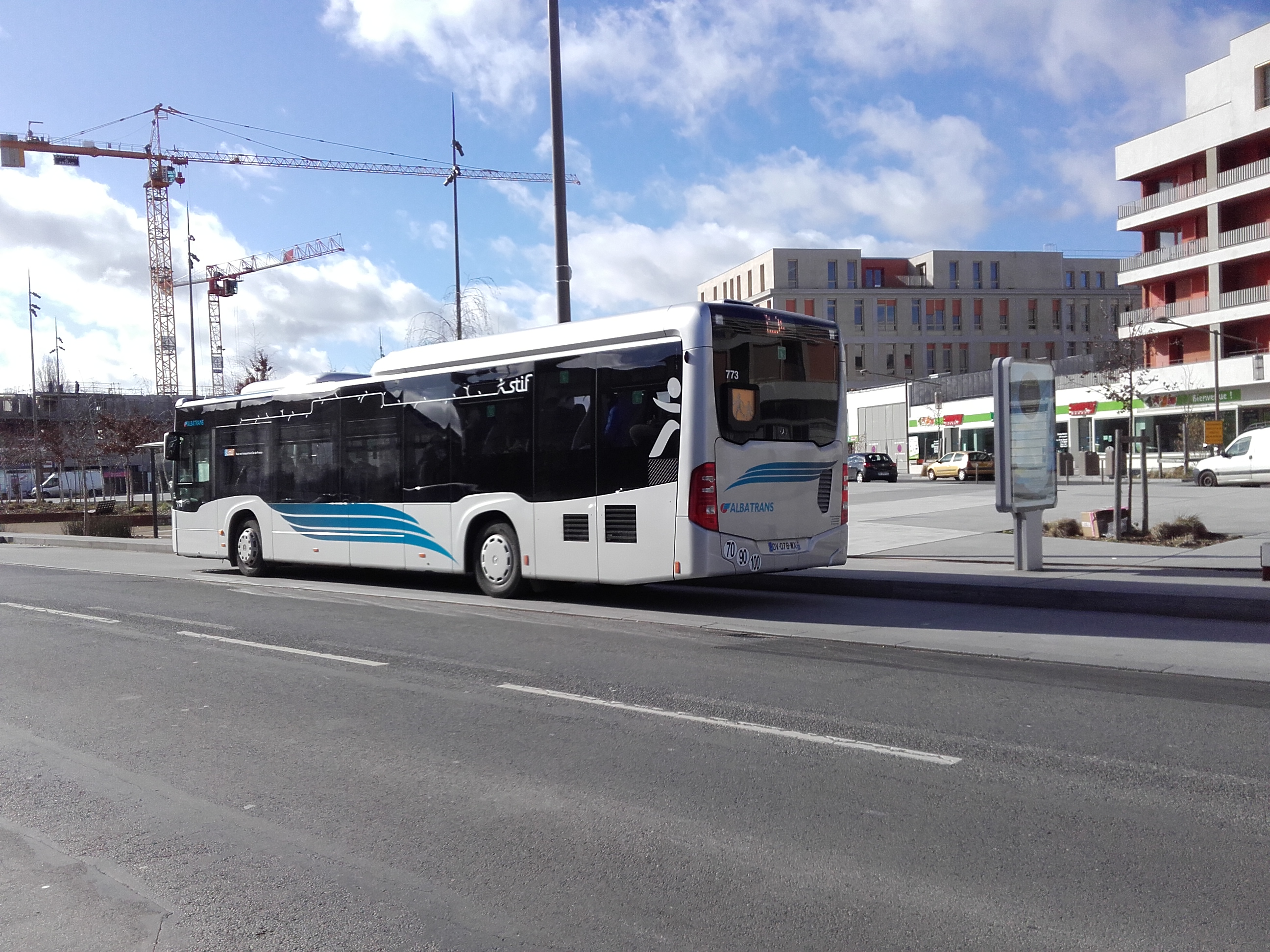 Mercedes Citaro C2 LE no 773 (appartenant au transporteur Daniel Meyer) à Brétigny-sur-Orge.